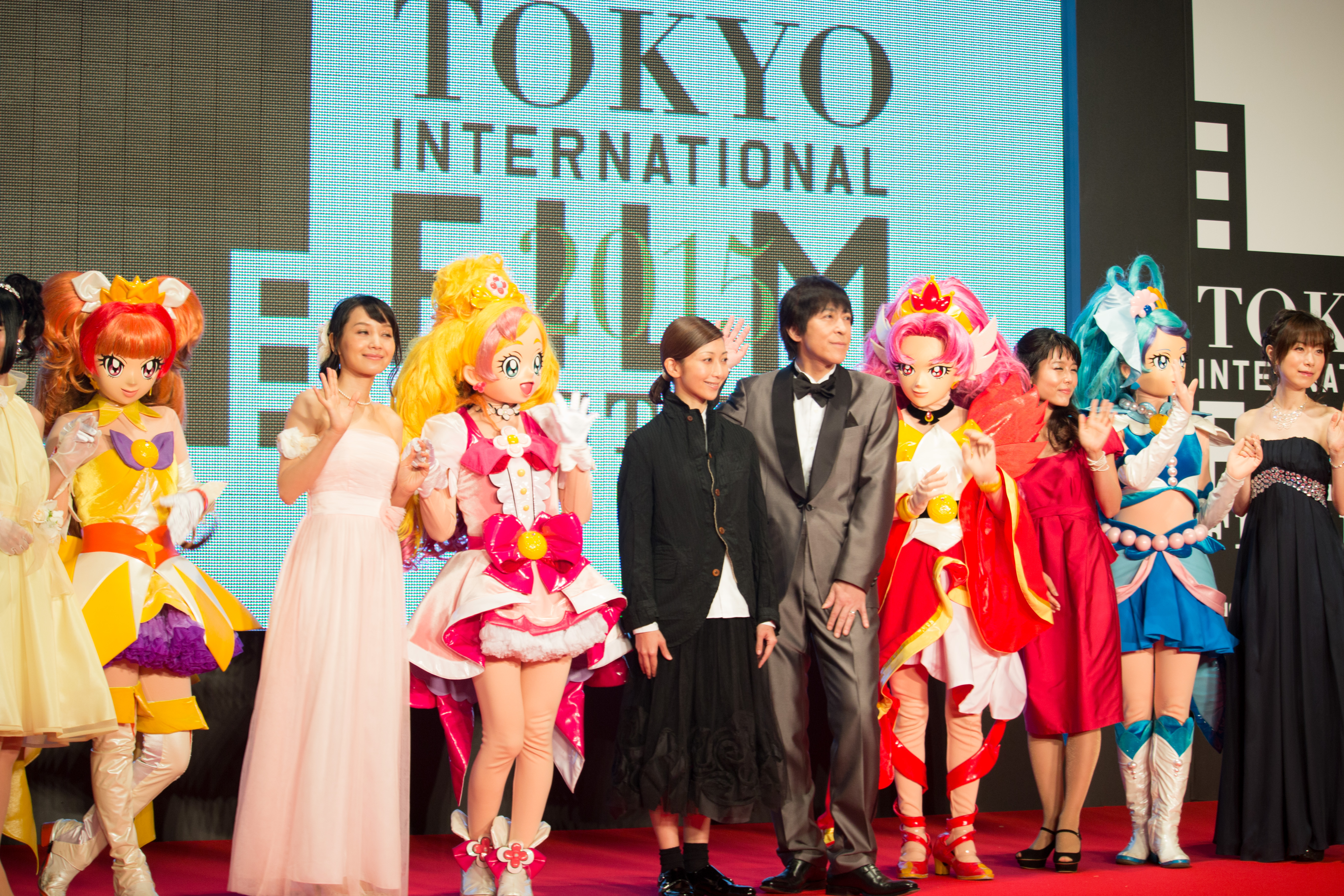 第28回 東京国際映画祭 オープニングセレモニー キャスト クルー (Go!プリンセスプリキュア)